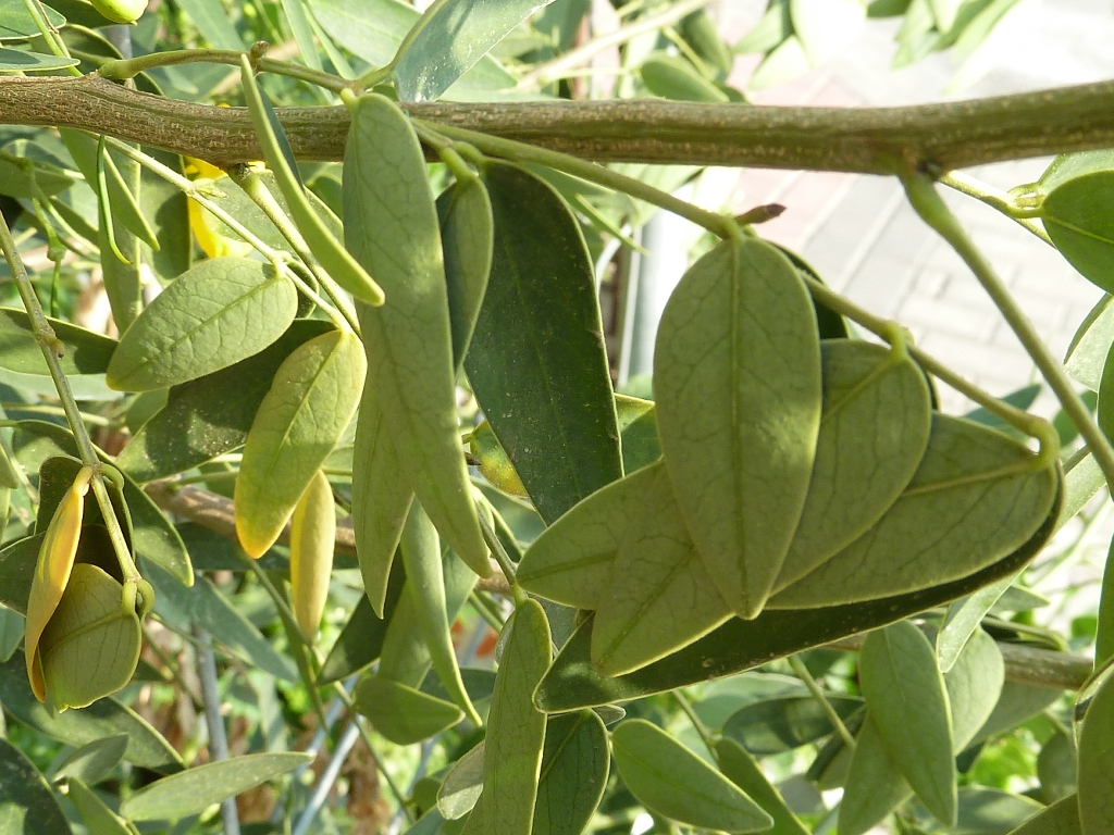 Senna corymbosa (Lmk.): hojas repliegadas a la sombra y de noche - Calle de Antonio Salas con la del Rey Carlos III, Águilas (Murcia).